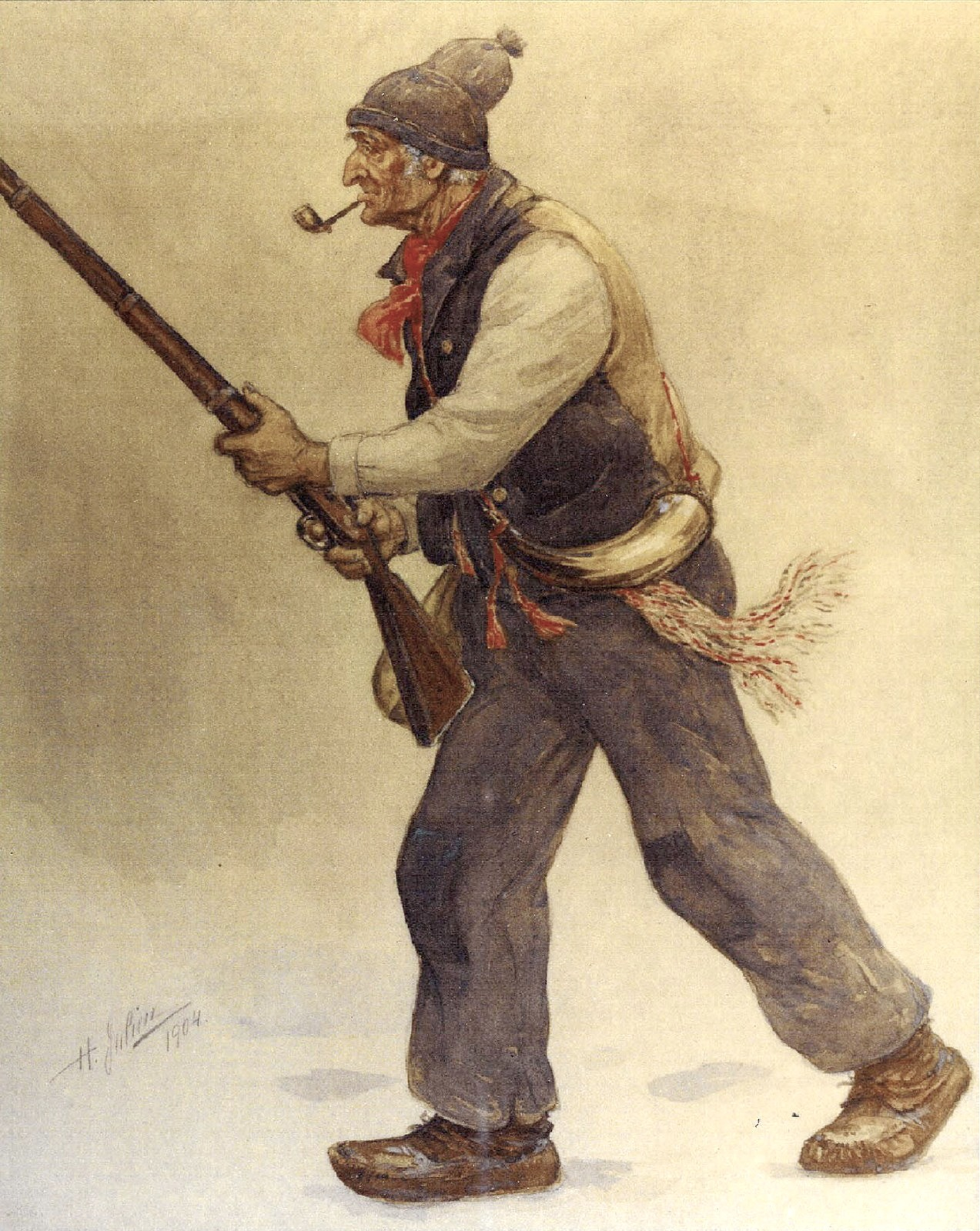 Le Patriote